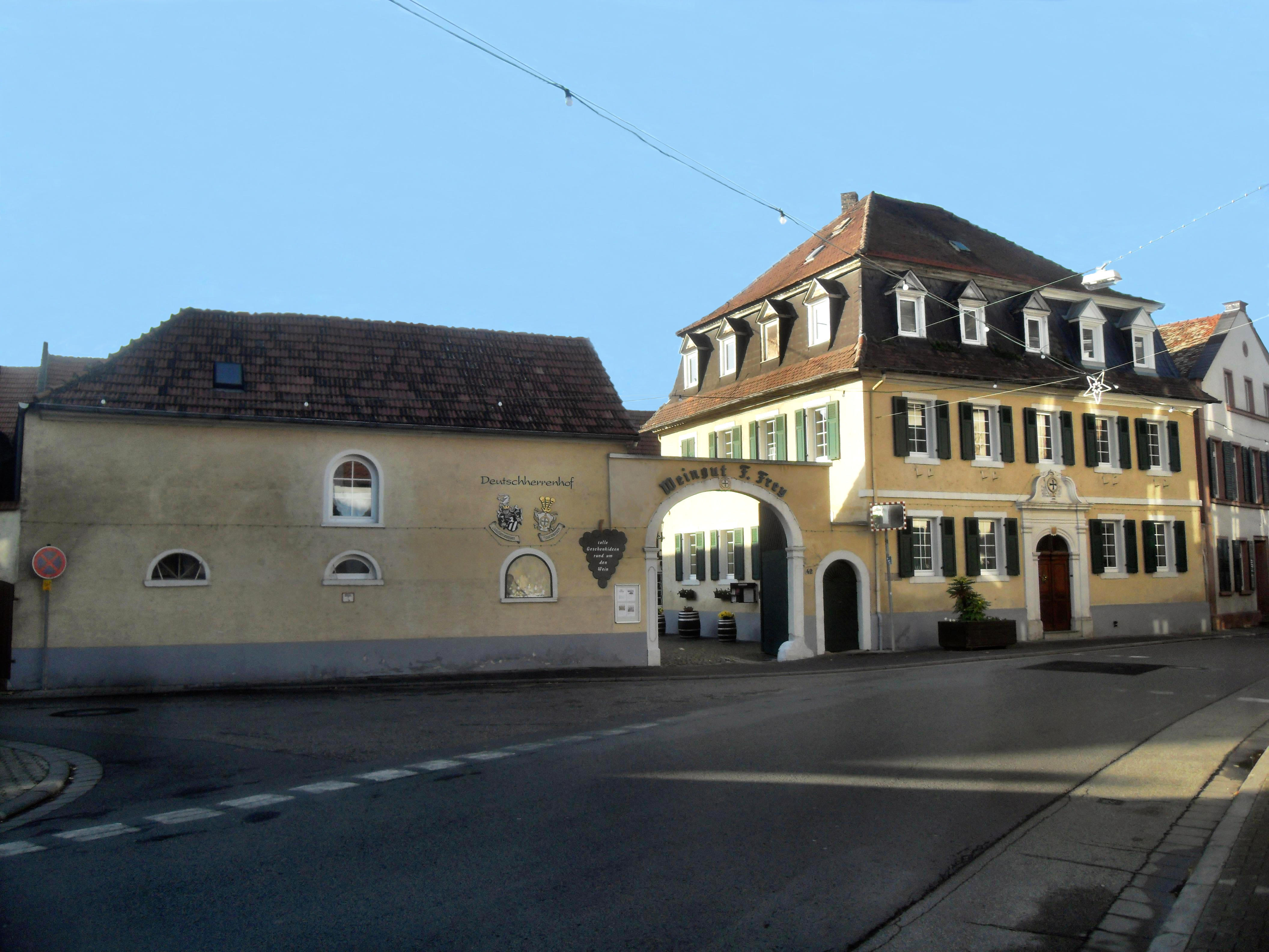 Das Anwesen des Deutschherrenhofs (Weingut Frey) in Guntersblum in Rheinhessen (Deutschland)